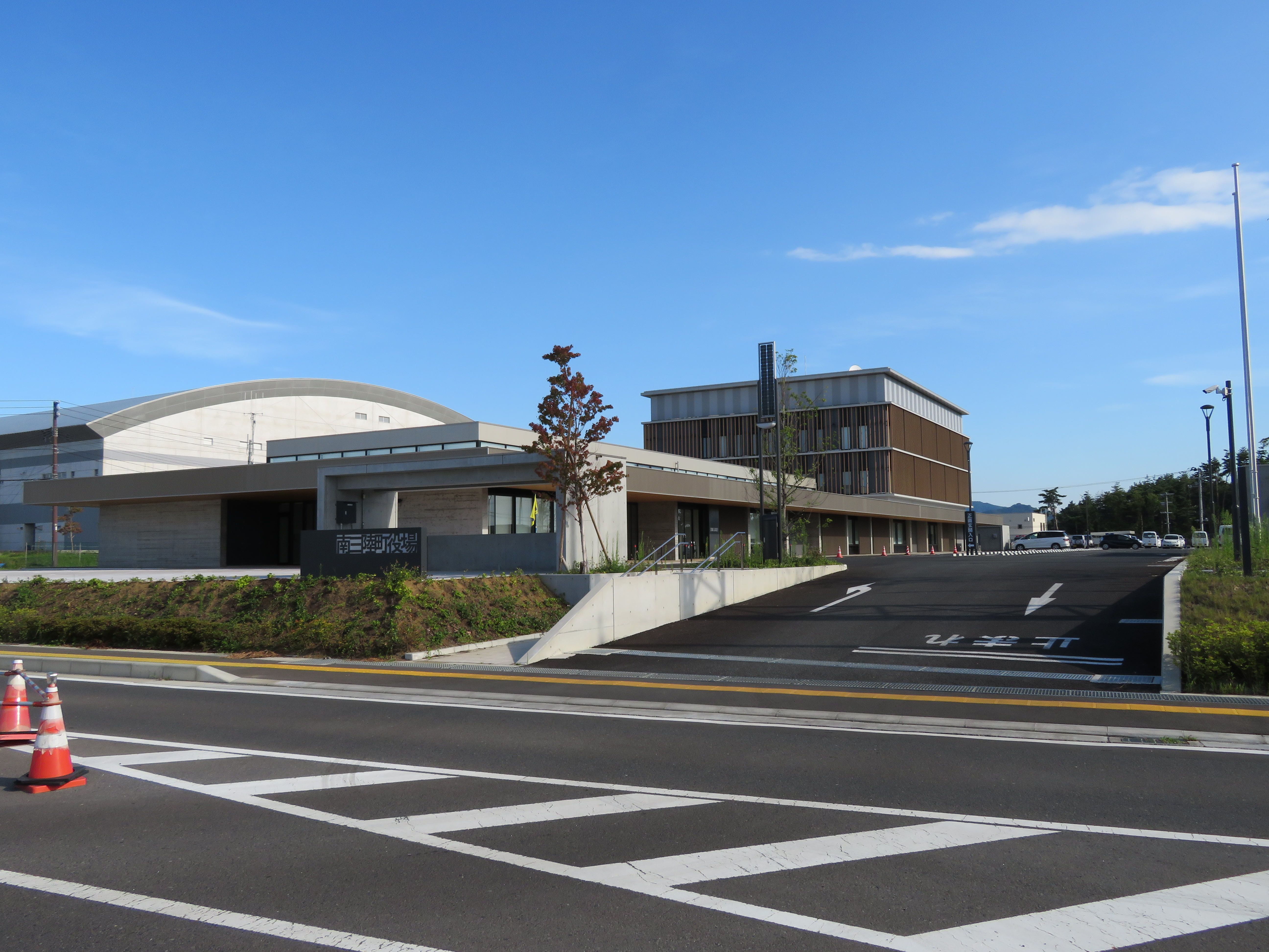 2017年9月に開庁した南三陸町役場庁舎 Canon PowerShot SX720 HS